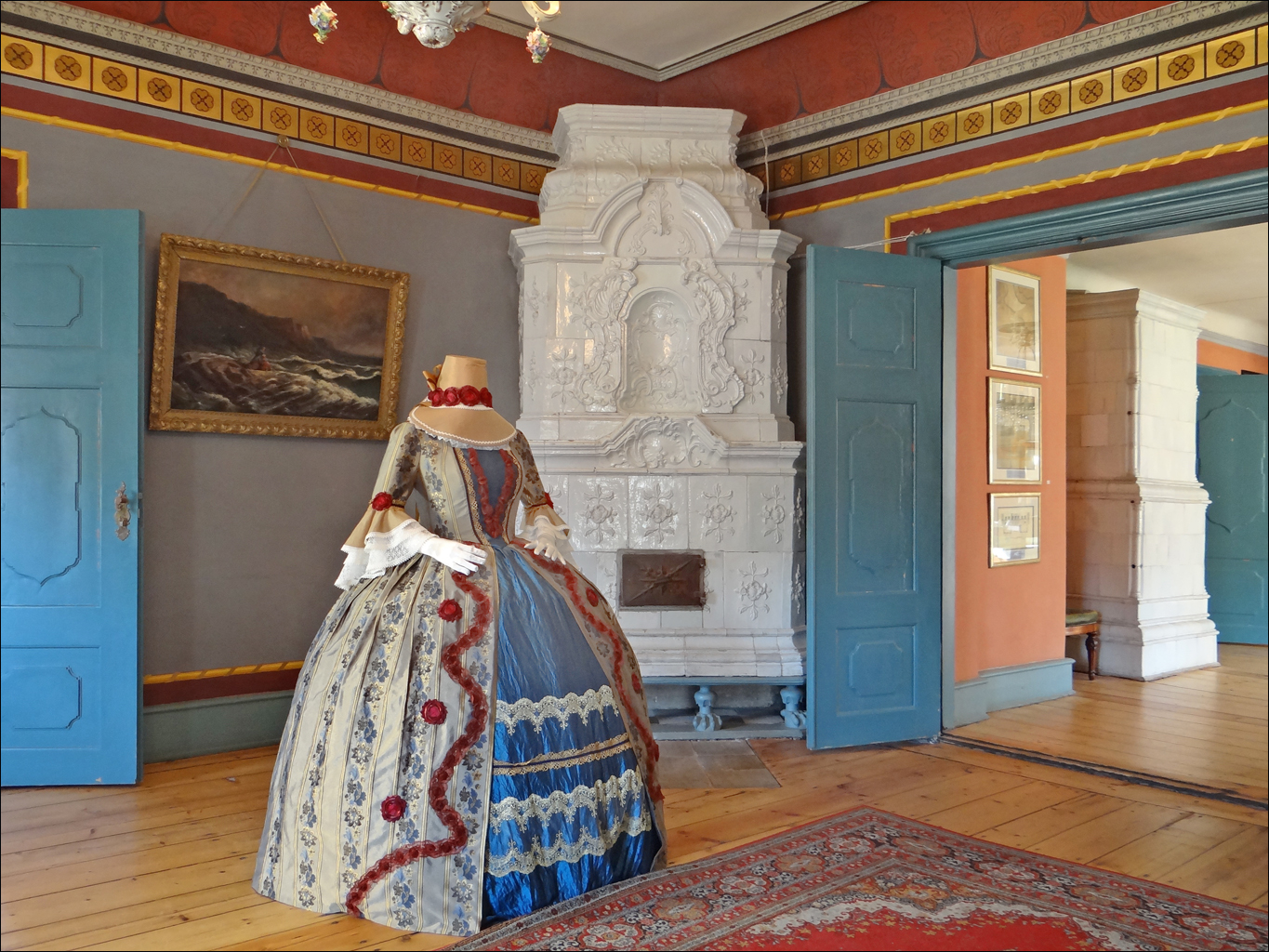 Pièce du premier étage